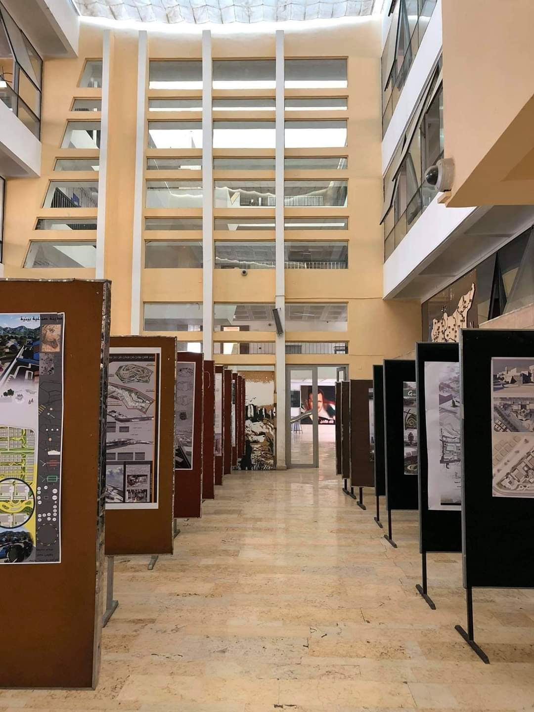 معرض في كلية الهندسة المعمارية بجامعة دمشق